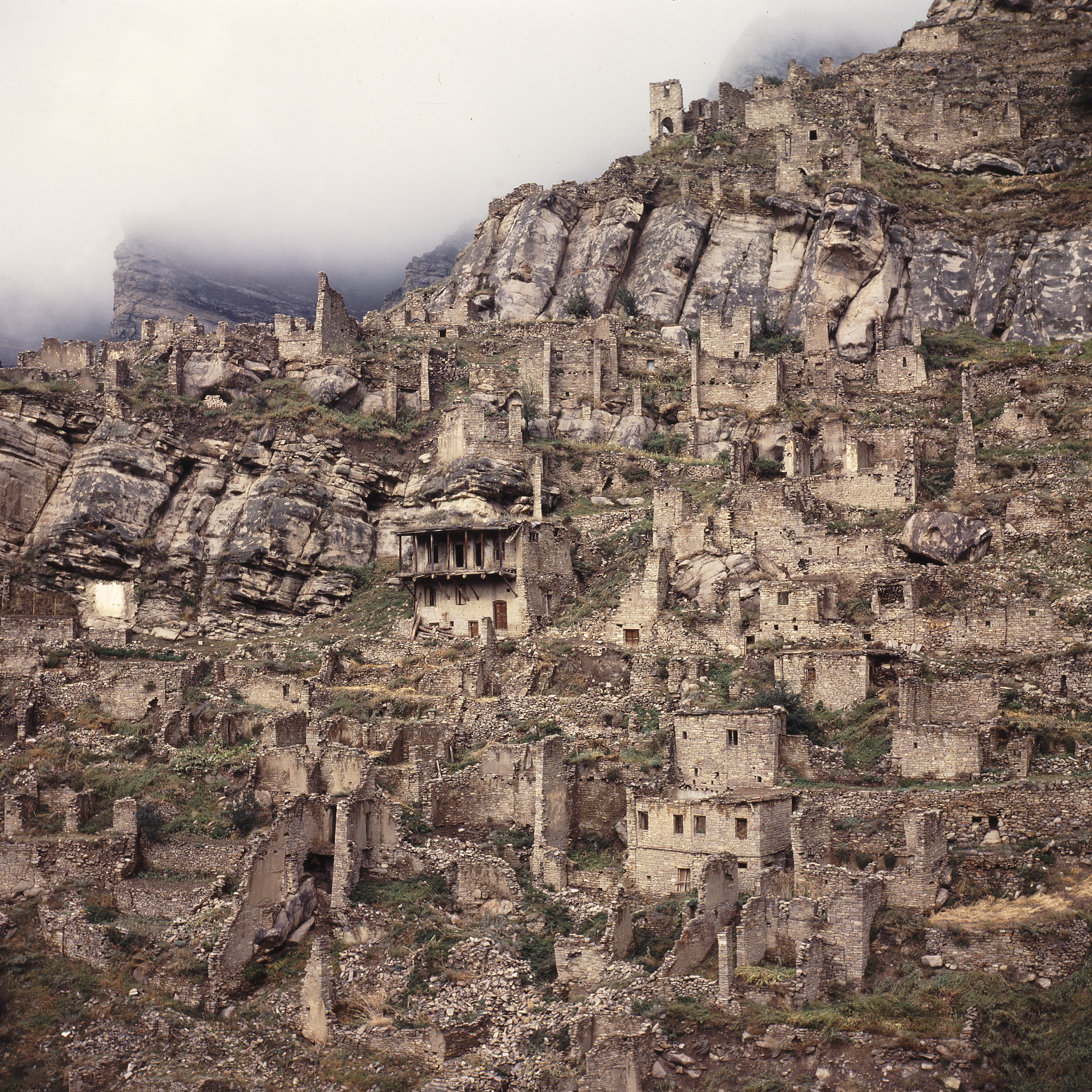 Эта фотография сделана мною во время 5-ти дневного автомобильного путешествия по Центральному Дагестану. Старый (Верхний) Кахиб сфотографирован со стороны Нового (Нижнего) Кахиба. Жители покинули Старый Кахиб несколько веков тому назад. При вскрытии захоронений археологи нашли в древних могилах останки очень крупных людей - практически все мужчины были выше двух метров. Культовые символы,сохранившиеся в домах говорят о том, что люди исповедовали христианство. Что засставило людей покинуть свои жилища неизвестно ...